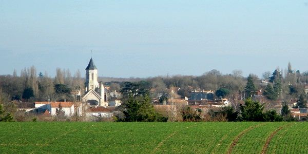 Échiré : vue de l'église et vue partielle du village.